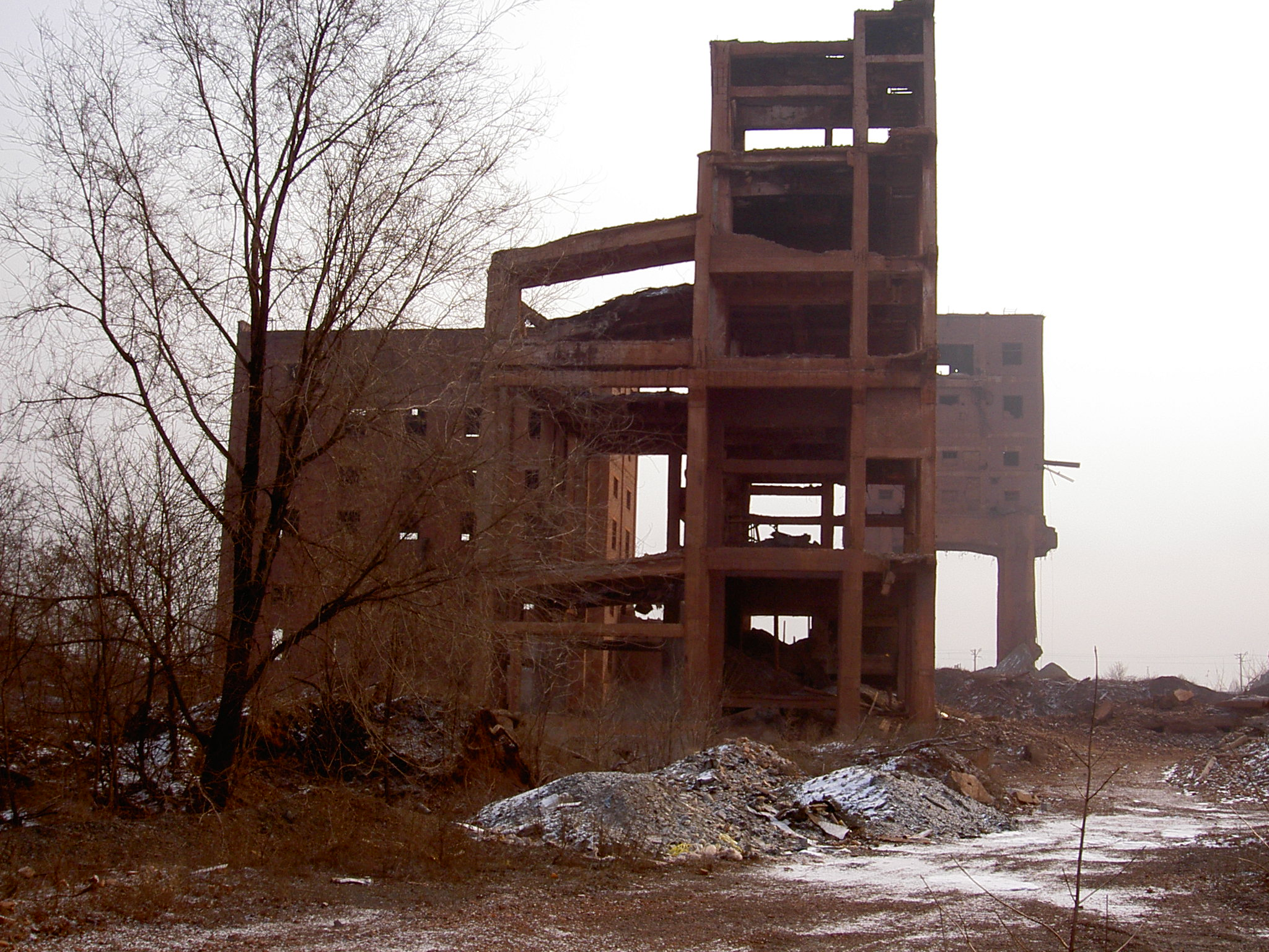 Закрытый ствол "Саксагань"